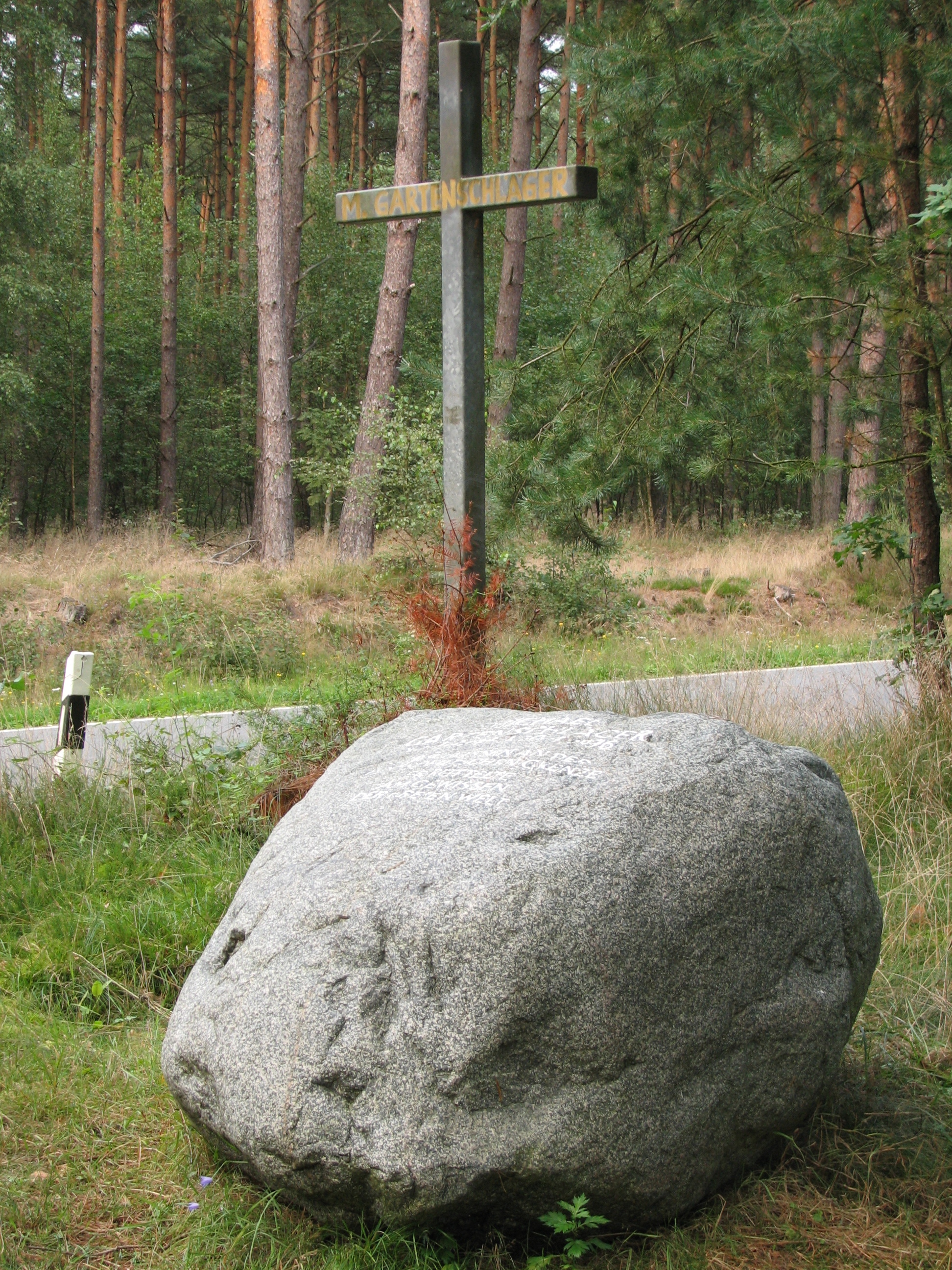 Michael-Gartenschläger-Gedenkstein mit Kreuz zwischen Bröthen und Langenlehsten an der Landstraße K28 im Gemeindegebiet von Langenlehsten in der Nähe des Sterbeortes Gartenschlägers. Die Inschrift auf dem Gedenkstein lautet: "MICHAEL GARTENSCHLÄGER *13,1,1944 †30,4,1976 ERSCHOSSEN AN DER INNERDEUTSCHEN GRENZE ER RÜTTELTE AM GEWISSEN DER FREIEN WELT".